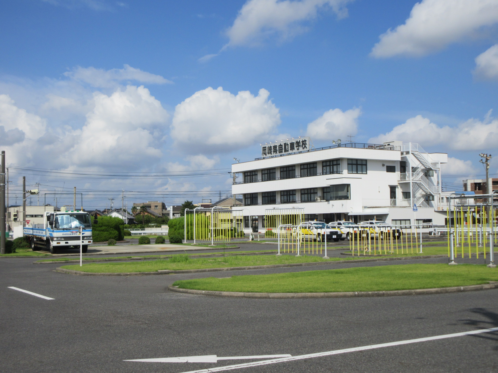 岡崎南自動車学校（岡崎市針崎）